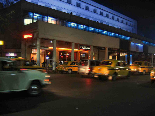 Yellow cabs in Kolkata